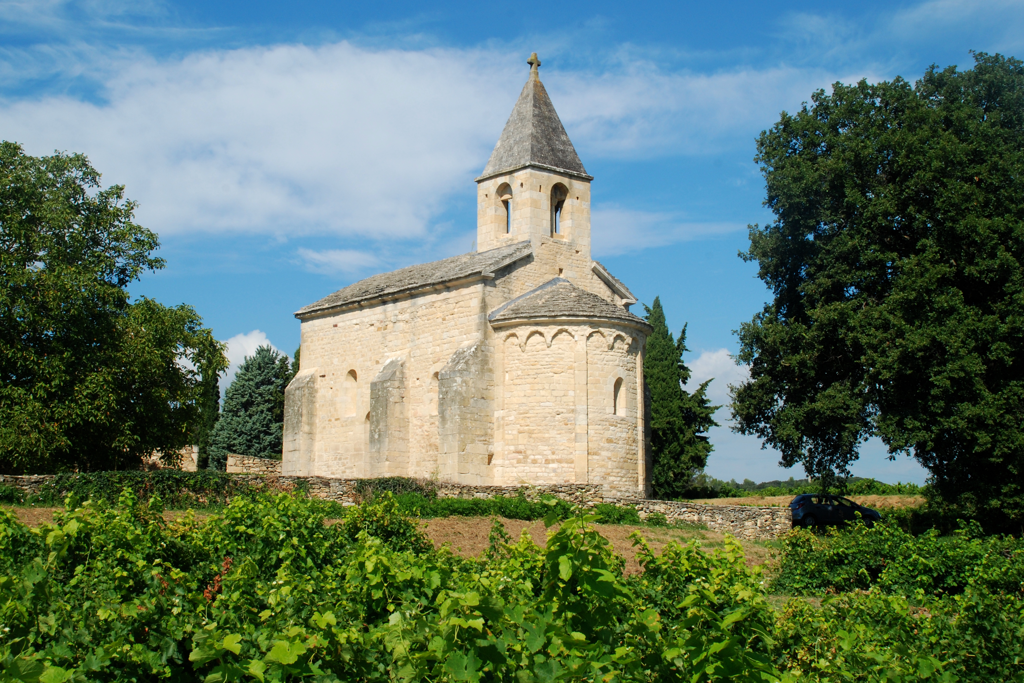 France - Gard - Chapelle Saint-Pierre de Vénéjan .